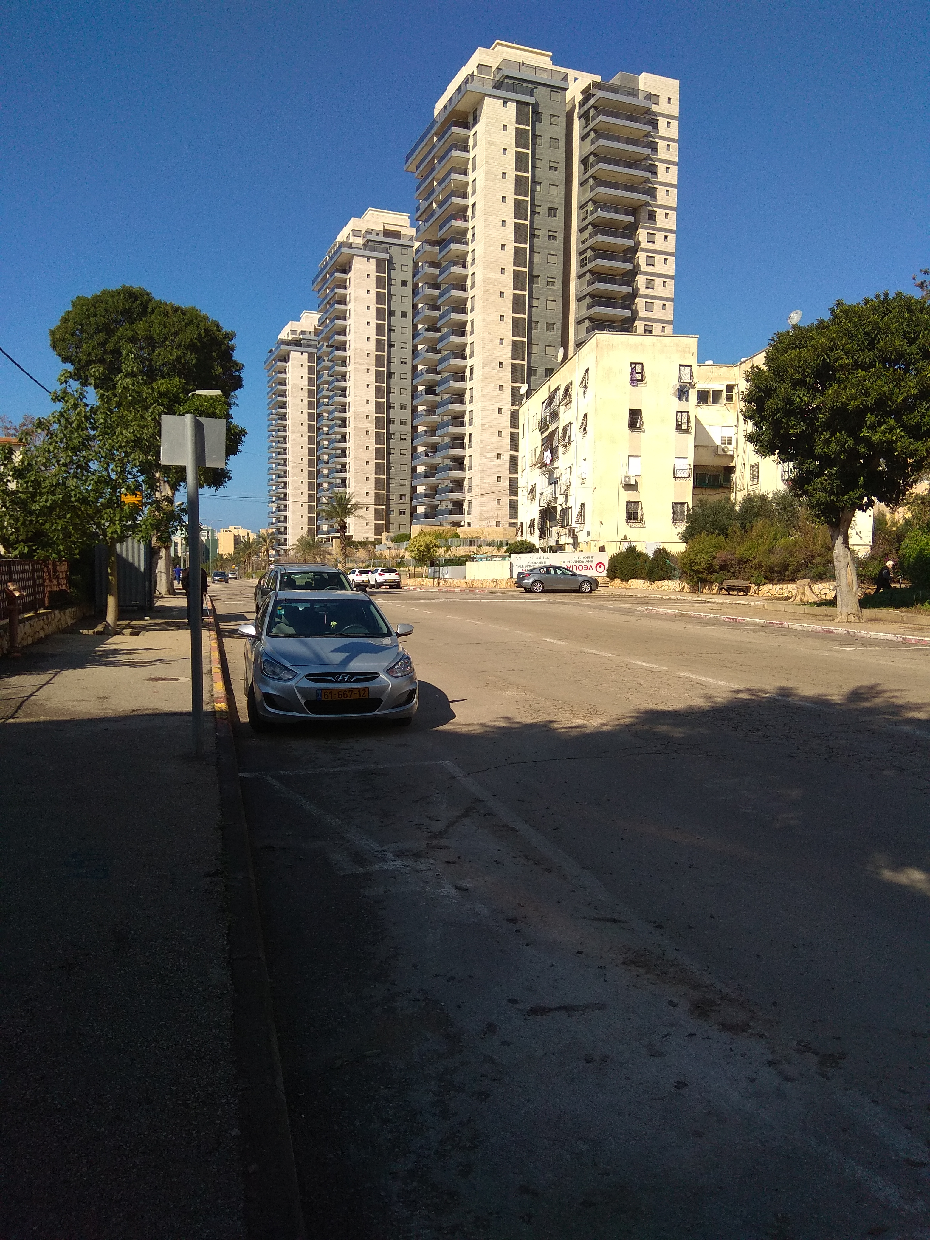 נווה דוד, וברקע מגדלים בשכונת רמת הנשיא